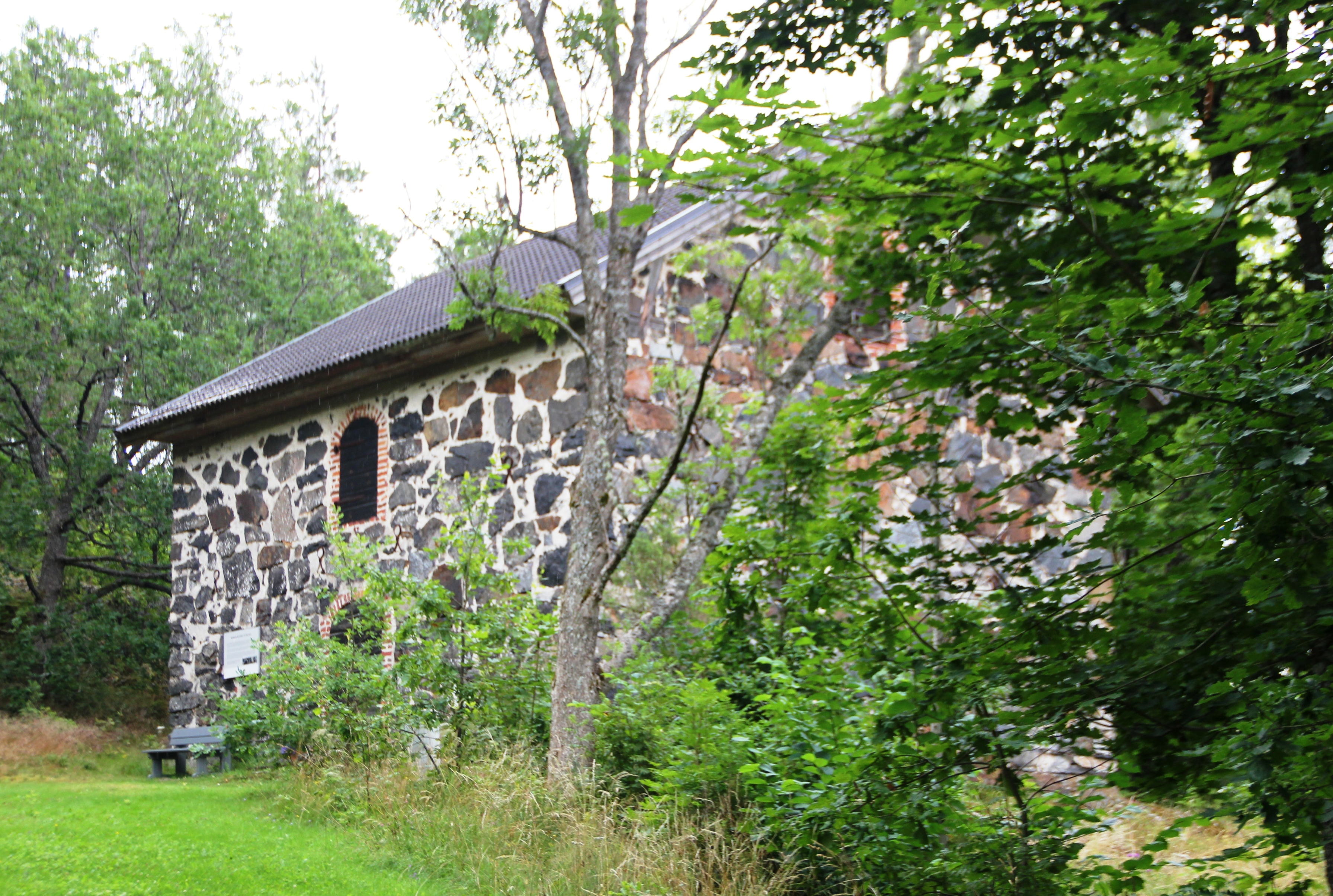 Kiskon kirkonkylän viljamakasiini, rakennettu 1847 - 1851, toimii nykyisin Kiskon kotiseutumuseona.